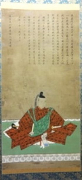 松浦棟の肖像。